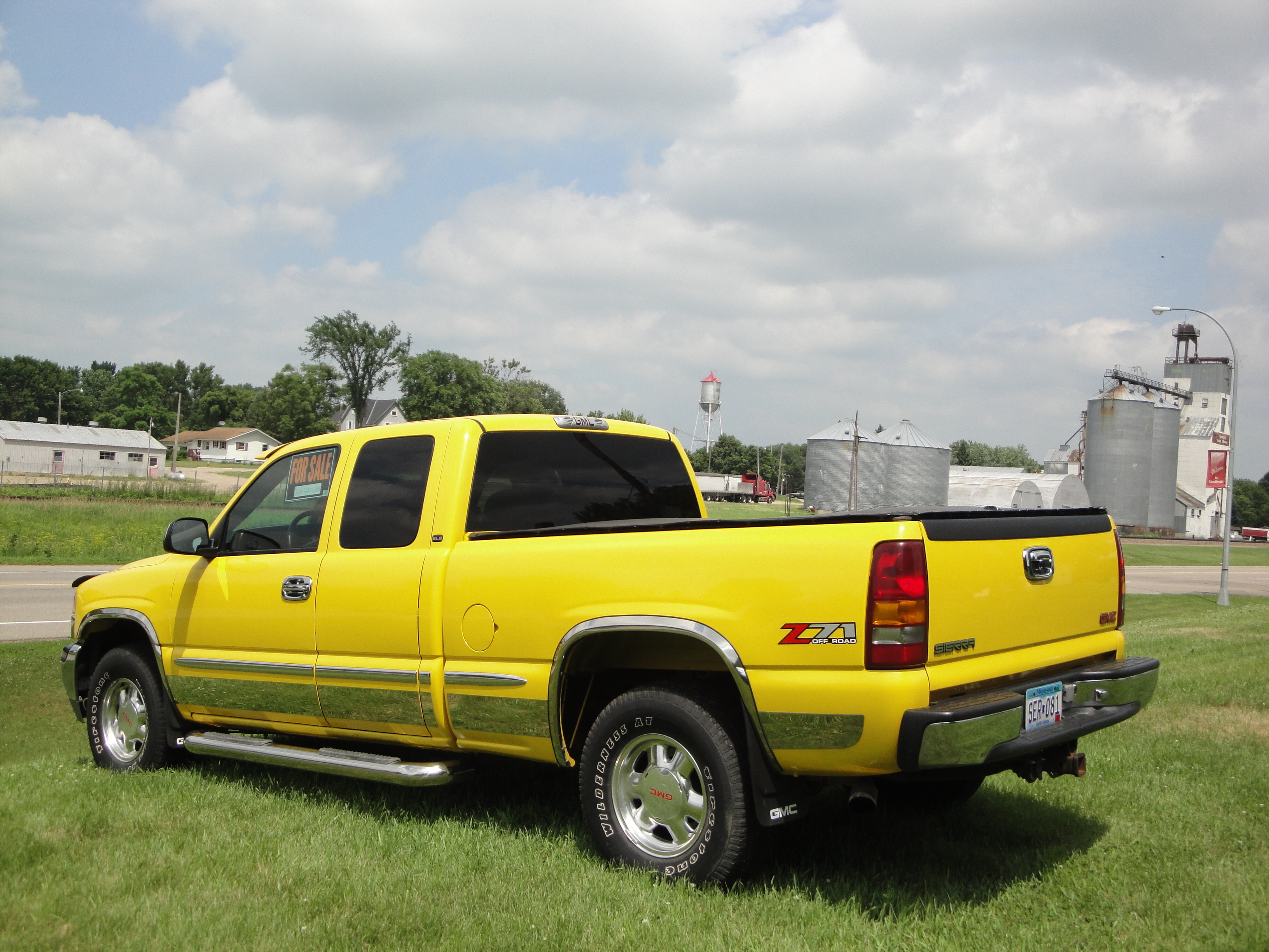 GMC Pick-Up